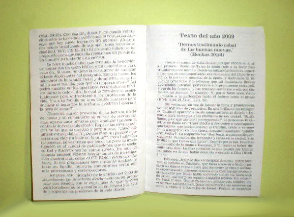 Páginas del libro Examinando las Escrituras diariamente 2009.